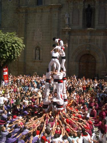 5 de 6 dels Margeners de Guissona, quan la colla encara actuava amb camisa blanca